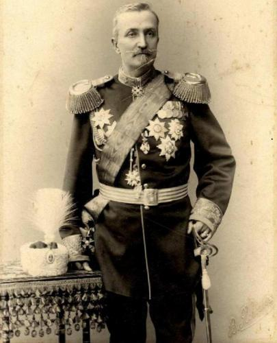 Српски (ћирилица): Генерал Јован Мишковић